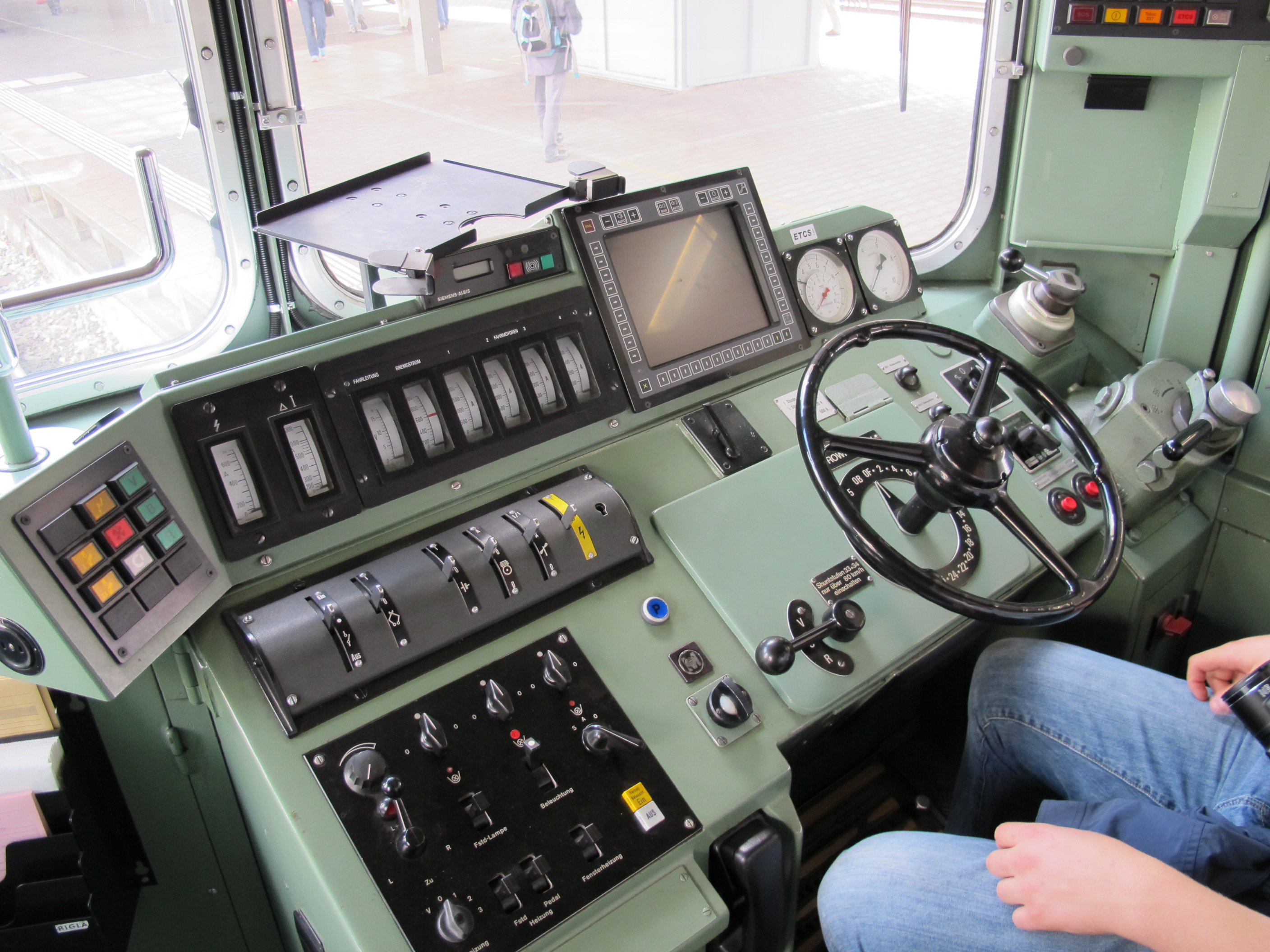 Führerstand einer BLS Re 425 (BLS Re 4/4) über Ampèremeter Fahrmotoren: ZUB Anzeige und Bedienung darunter, zwischen Fahrtrichtungshebel und Bedienfeld für Heizung und Beleuchtung: Bedienung Integra-Signum die Lok ist ausserdem mit ETCS ausgetattet, Anzeige und Bedienung über Monitor